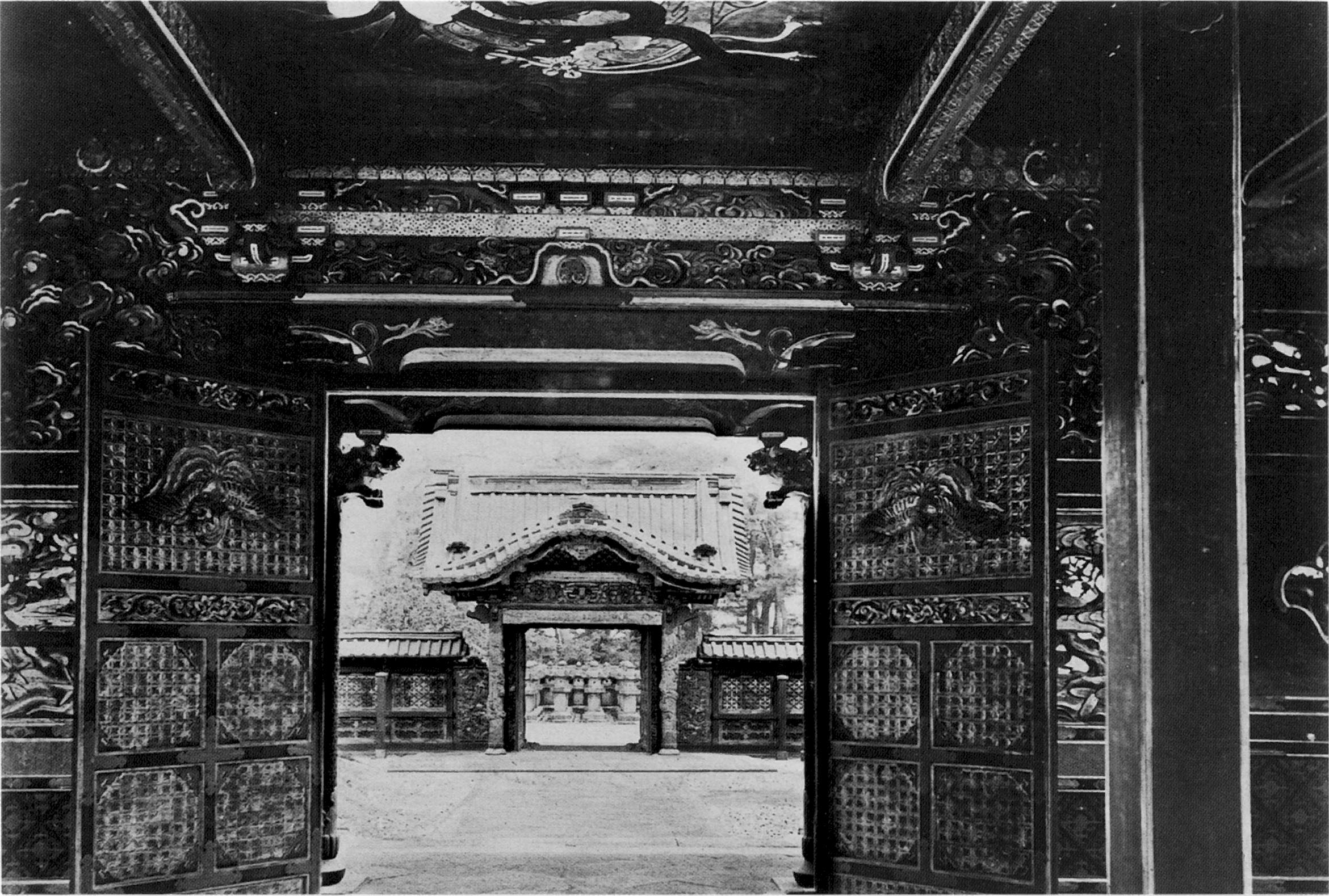 増上寺 有章院殿 (7代家継公) 霊廟 中門・左右廊内部 1717年造営、1945年焼失。旧 国宝。